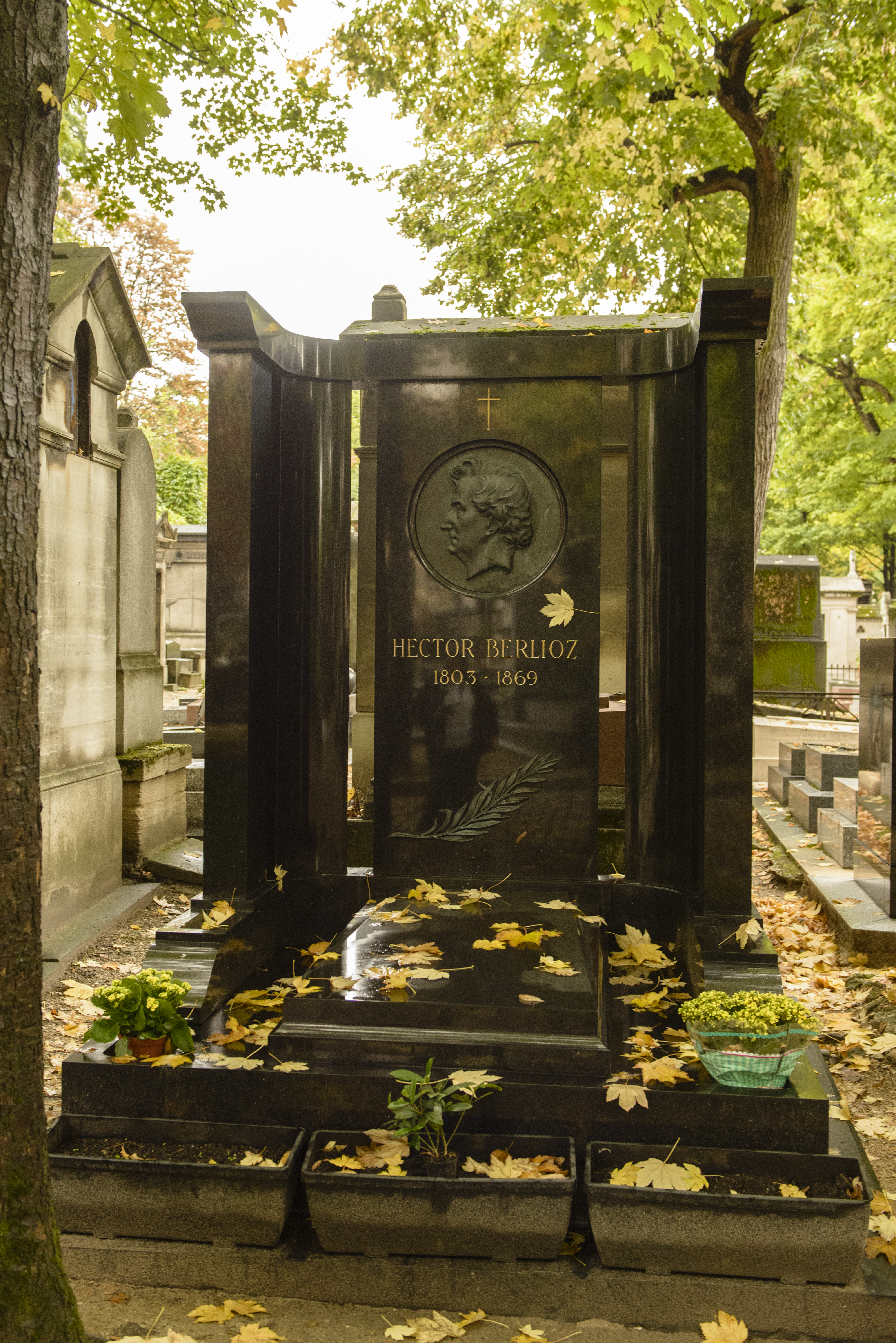 Cimetiere de Montmartre.